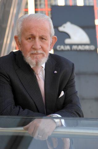 Fotografía del escritor Luis Blanco Vila